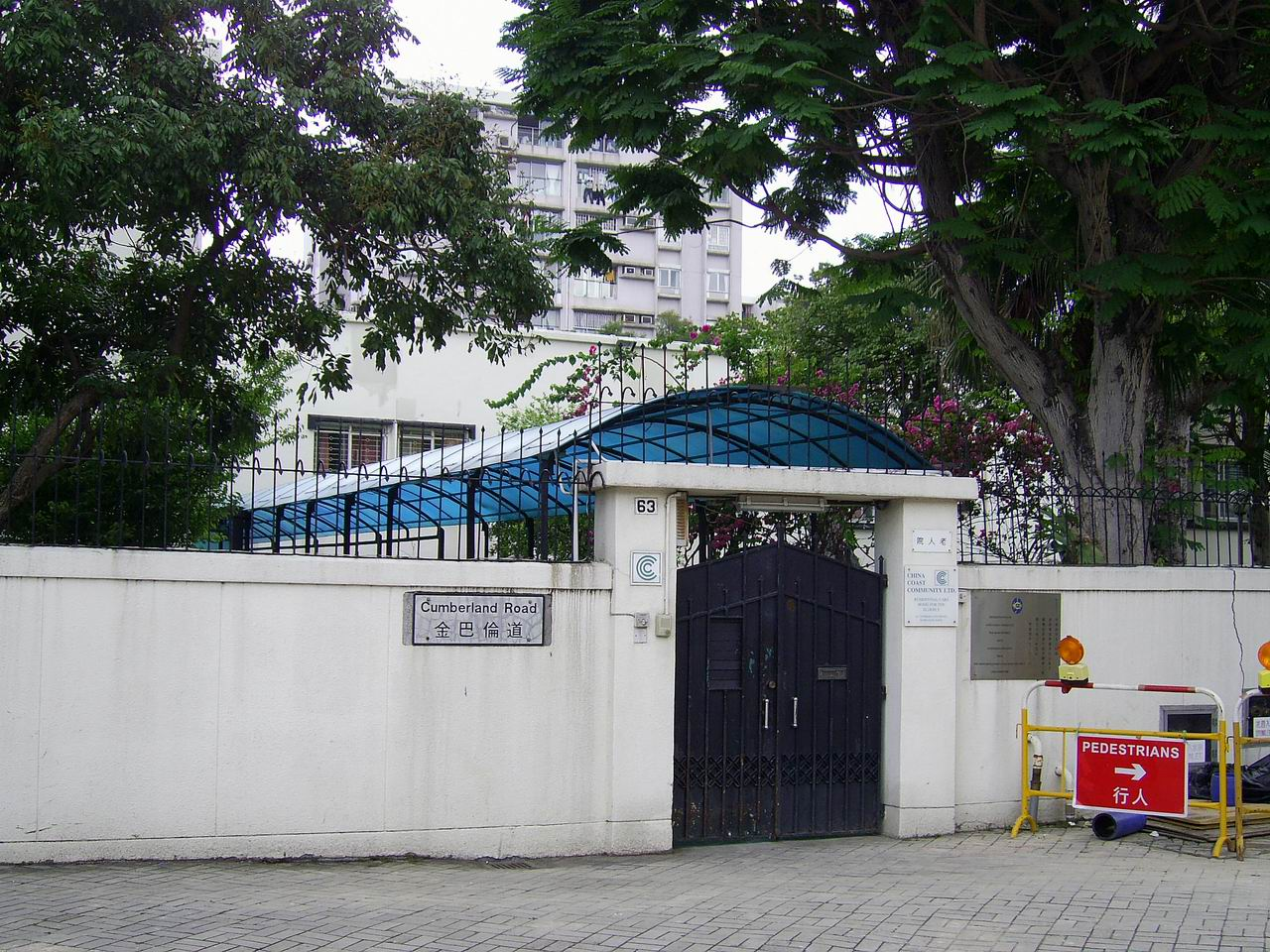 中文（香港）: 中華海岸老人院